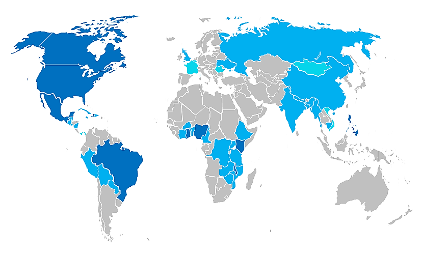 Pays en bleu foncé: Église établie, assemblée dans la majorité des régions. Pays en bleu clair: présence missionnaire, petites assemblées autonomes, peu de membres. Pays en bleu pâle: présence ponctuelle ou très restreinte de missionnaires ou autres membres de l'Église.